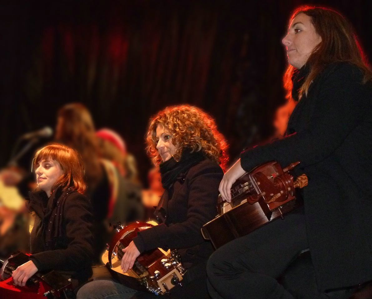 Sondeseu23